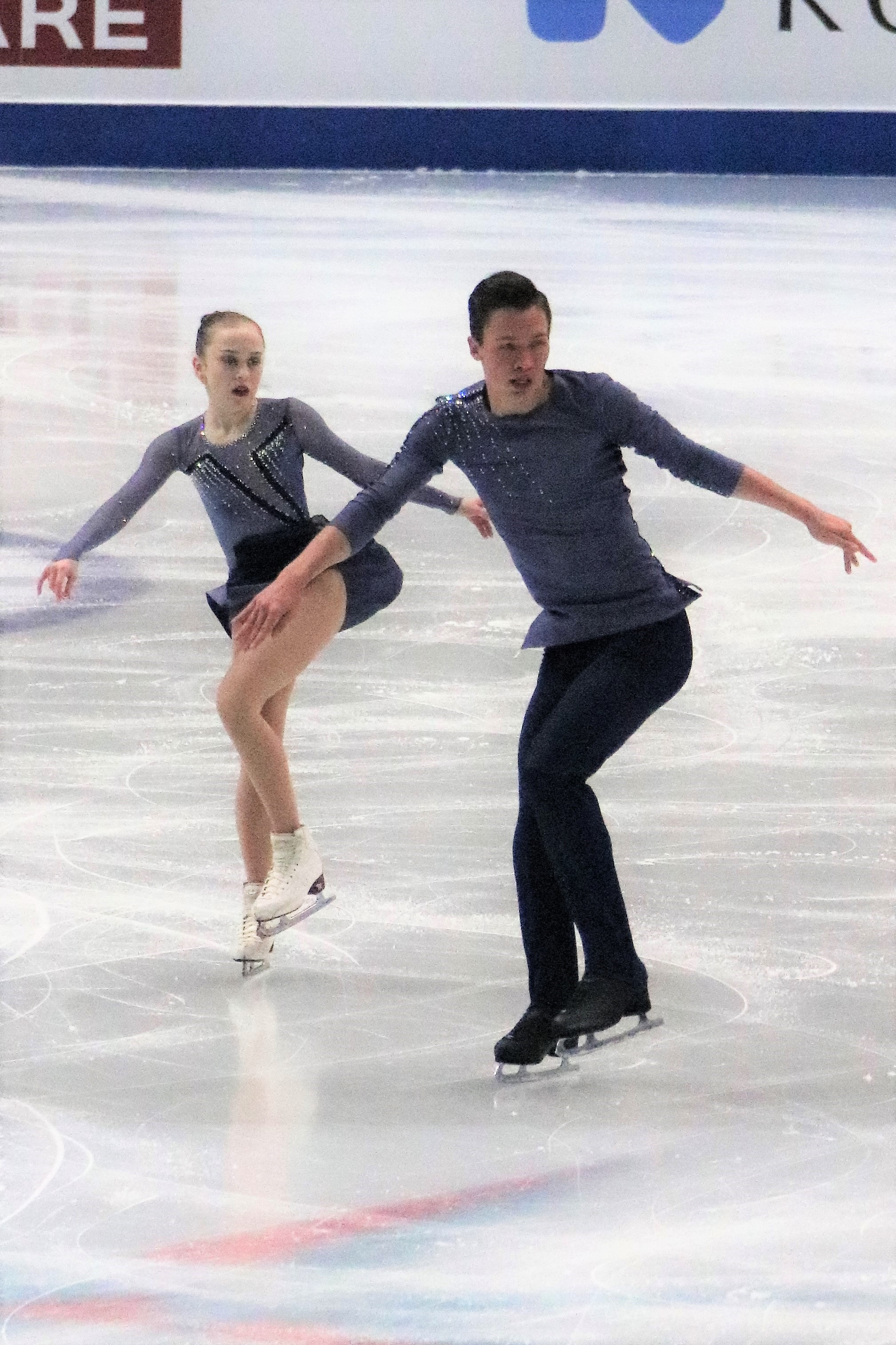 Юлия Артемьева / Михаил Назарычев (Россия) на финале юниорского Гран-при 2019-2020